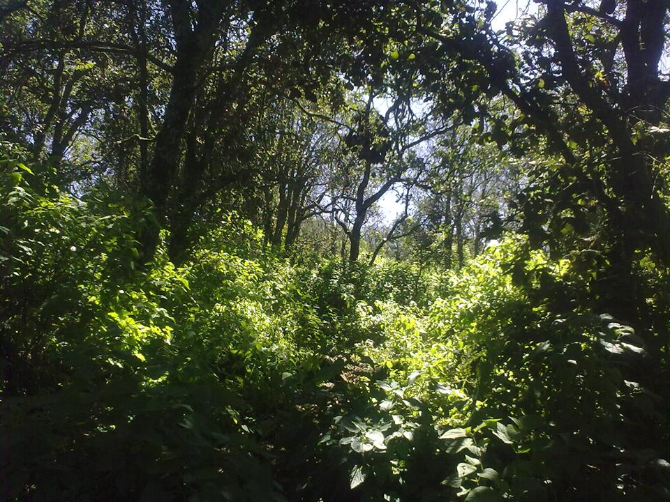 fotografia de la fauna de Chapa de Mota.